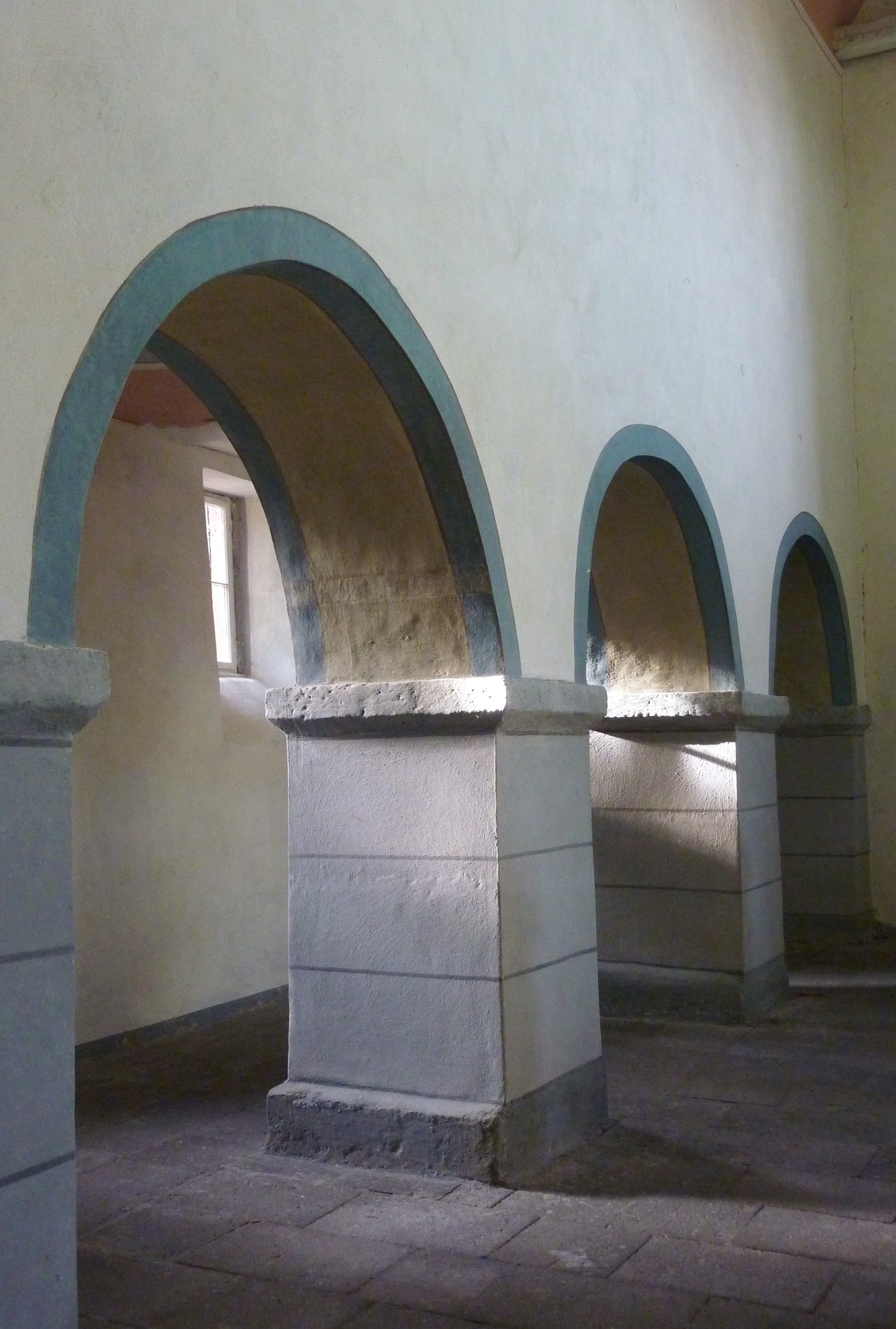 Katholische Friedhofskapelle St. Georg in Polch, Rundbogenarkaden und Pfeiler